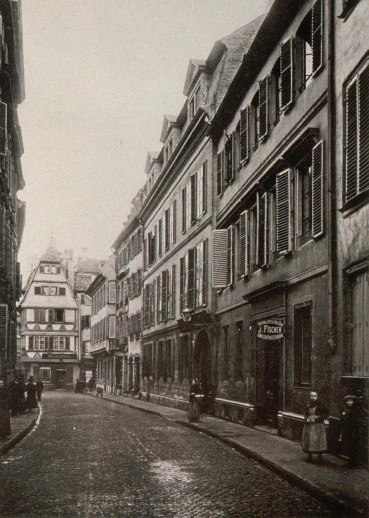 Straßburg. Judengasse